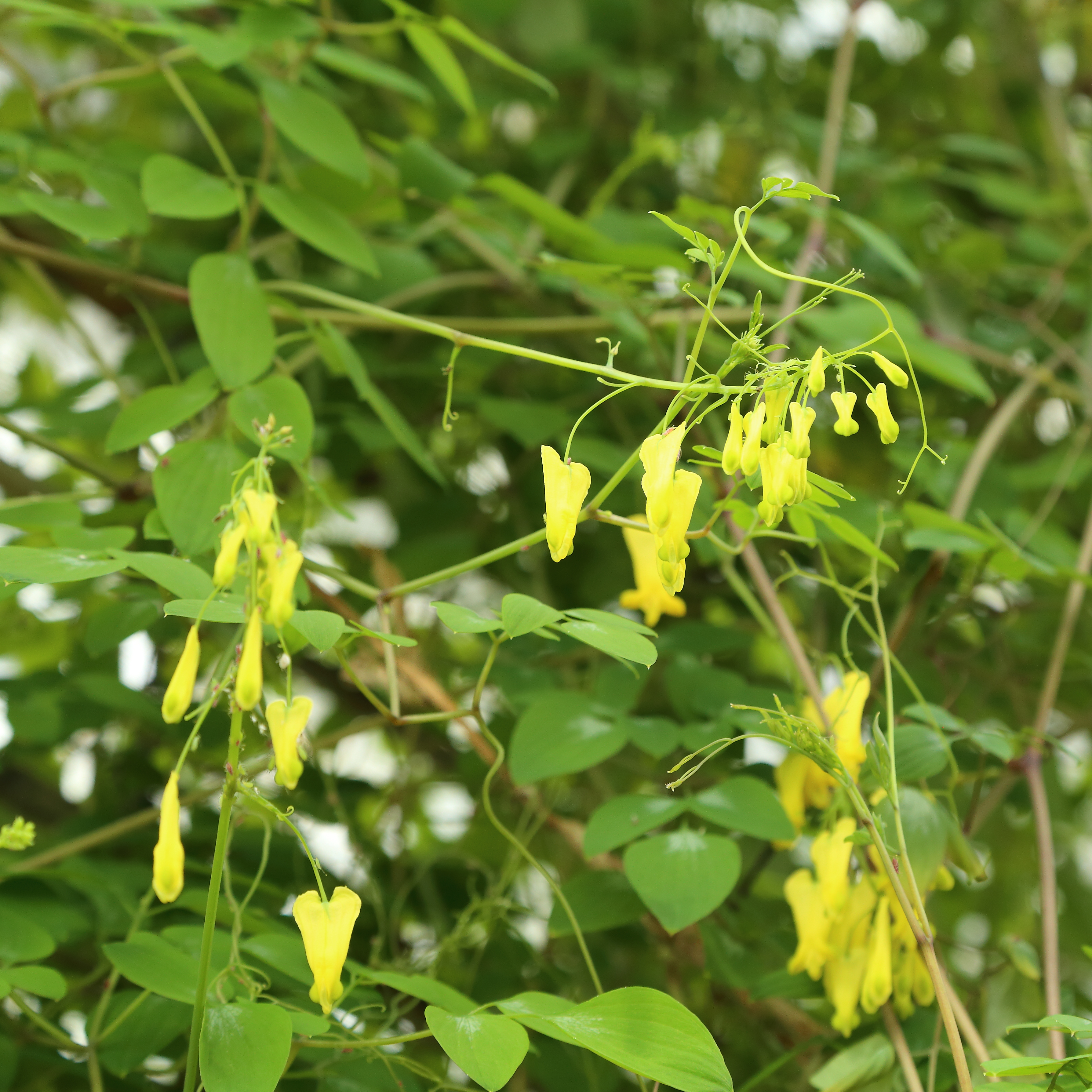 Dactylicapnos macrocapnos identifierad med hjälp av skylt i Göteborgs botaniska trädgård.